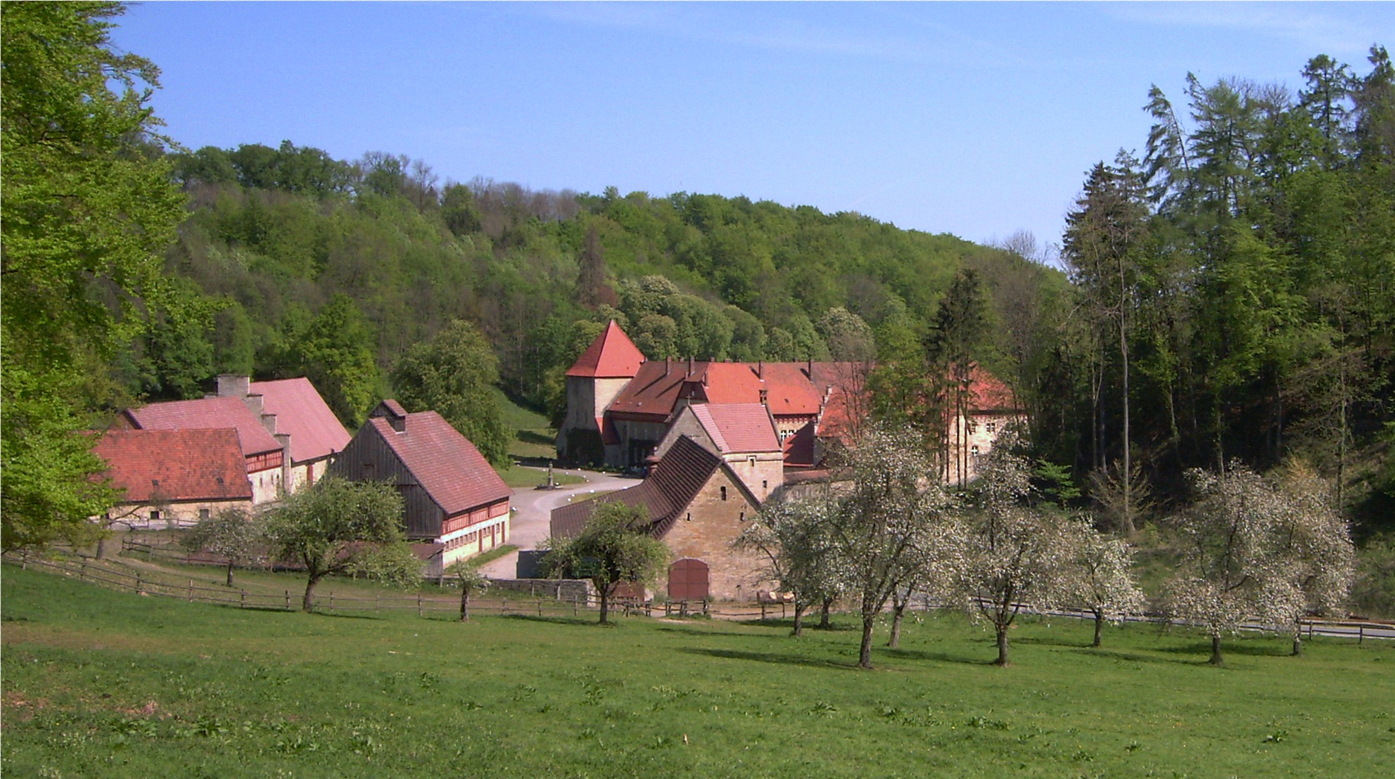 Ehemaliges Kloster und heutiges Gut Böddeken, bei Wewelsburg, Kreis Paderborn.